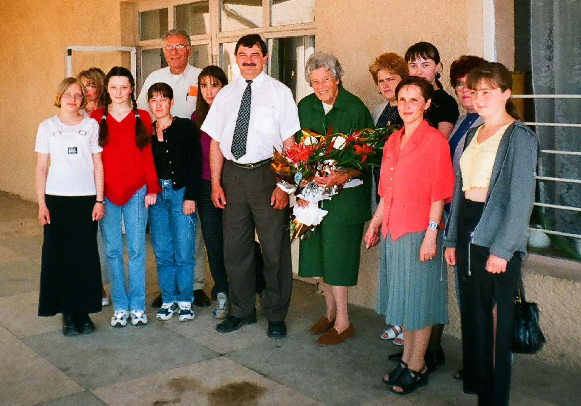 Графиня Крістіан Шенборн-Бухгейм в гостях у школярів Мукачівської ЗОШ № 7